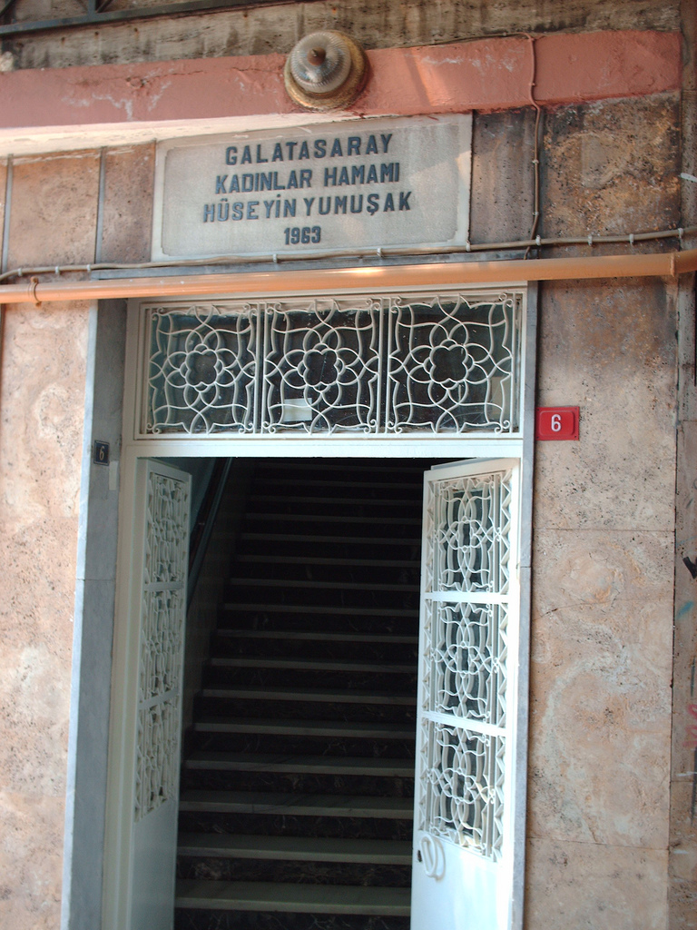 Galatasaray Hamamı in Istanbul